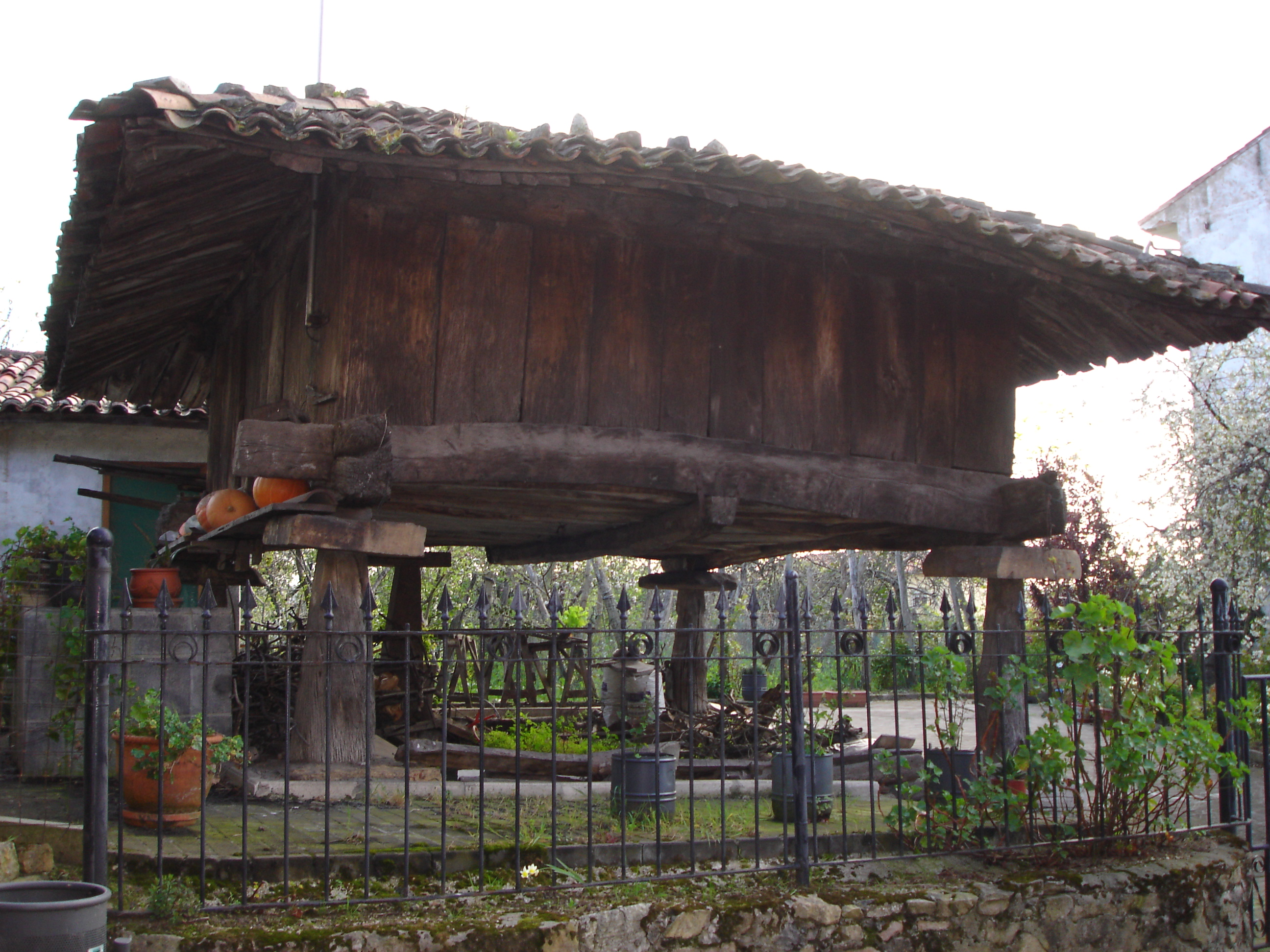 HórreoLlaranes